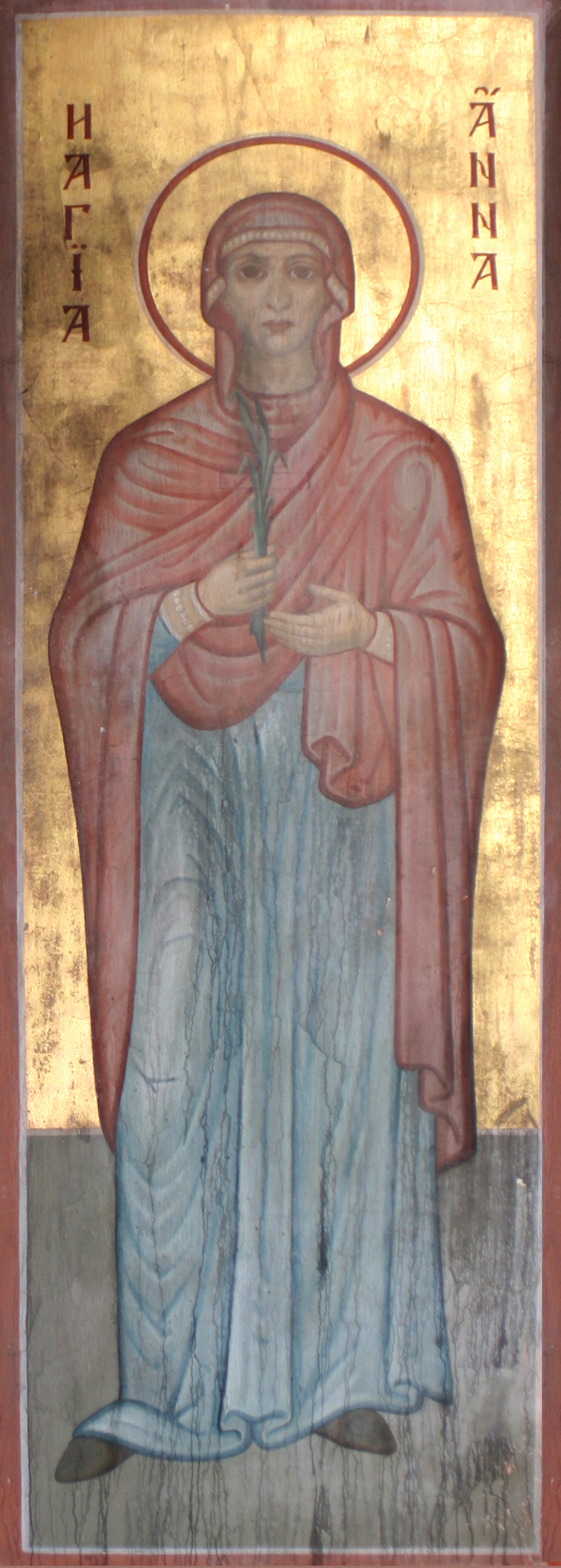 Изображение Святой анны на одном из столпов в Георгиевском соборе Юрьева монастыря (Великий Новгород)